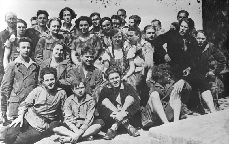 Berlin-Neukölln, KJV-Gruppe, Olga Benario-Prestes ADN-ZB/IML-ZPA Olga Benario-Prestes Antifaschistin geb. 12.2.1908 München April 1942 in Bernburg ermordet emigrierte 1933 in die Sowjetunion; 1935 folgte sie dem brasilianischen KP-Führer Luis Carlos Prestes in dessen Heimat. Von Brasilien wurde sie im Frühjahr 1936 an die Gestapo ausgeliefert. Im November 1936 gebar sie im Berliner Frauengefängnis eine Tochter, die auf Grund internationaler Proteste an die Mutter von L.C. Prestes übergeben werden mußte. Olga Benario-Prestes wurde in das KZ-Ravensbrück verschleppt und in Bernburg vergast. Mit einer Gruppe des KJV in Berlin-Neukölln. 1926/27 (letzte Reihe).